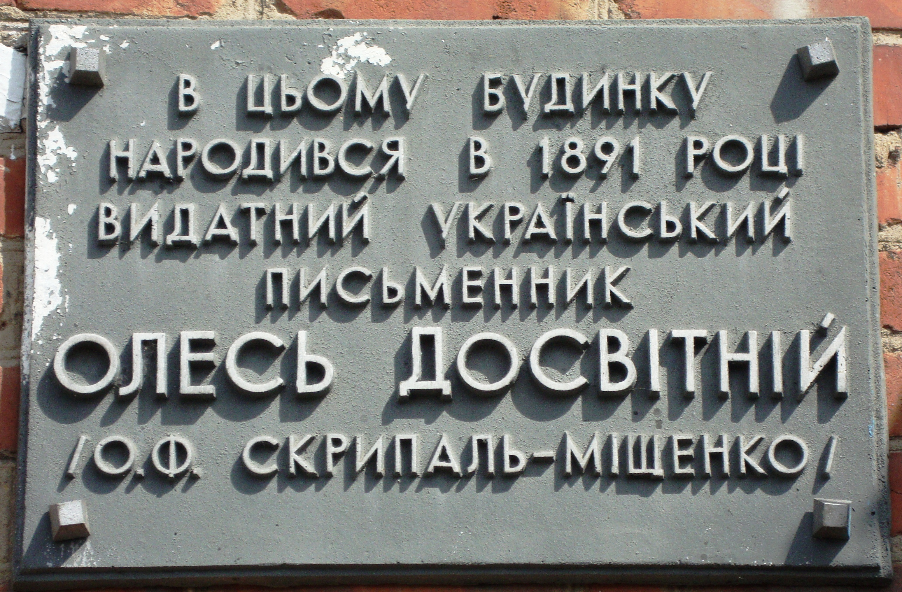 Меморіальна дошка на будинку, у якому народився письменник Олесь Досвітній